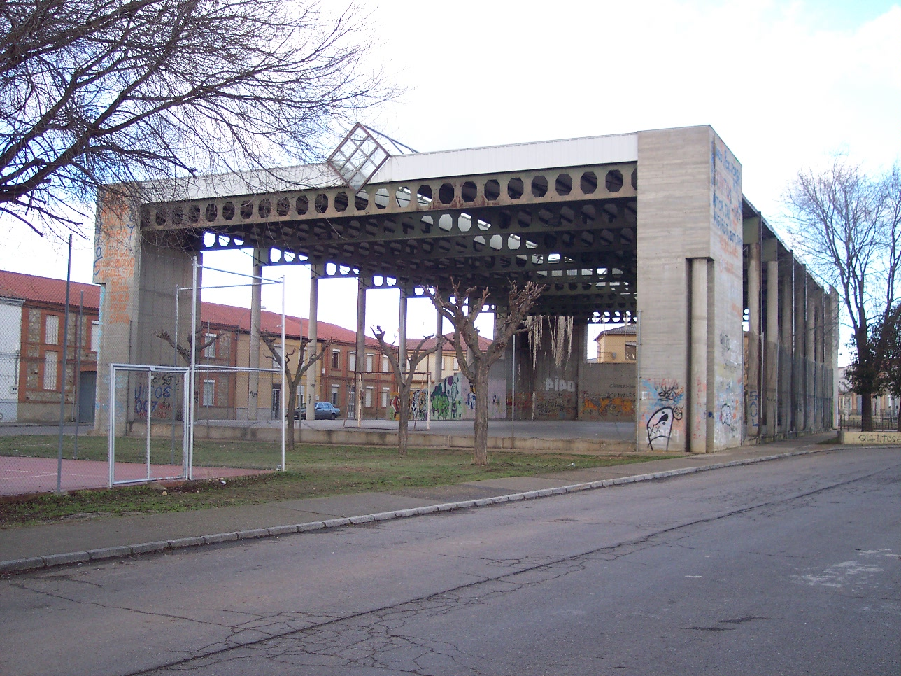 Pabellón deportivo de San Justo de la Vega